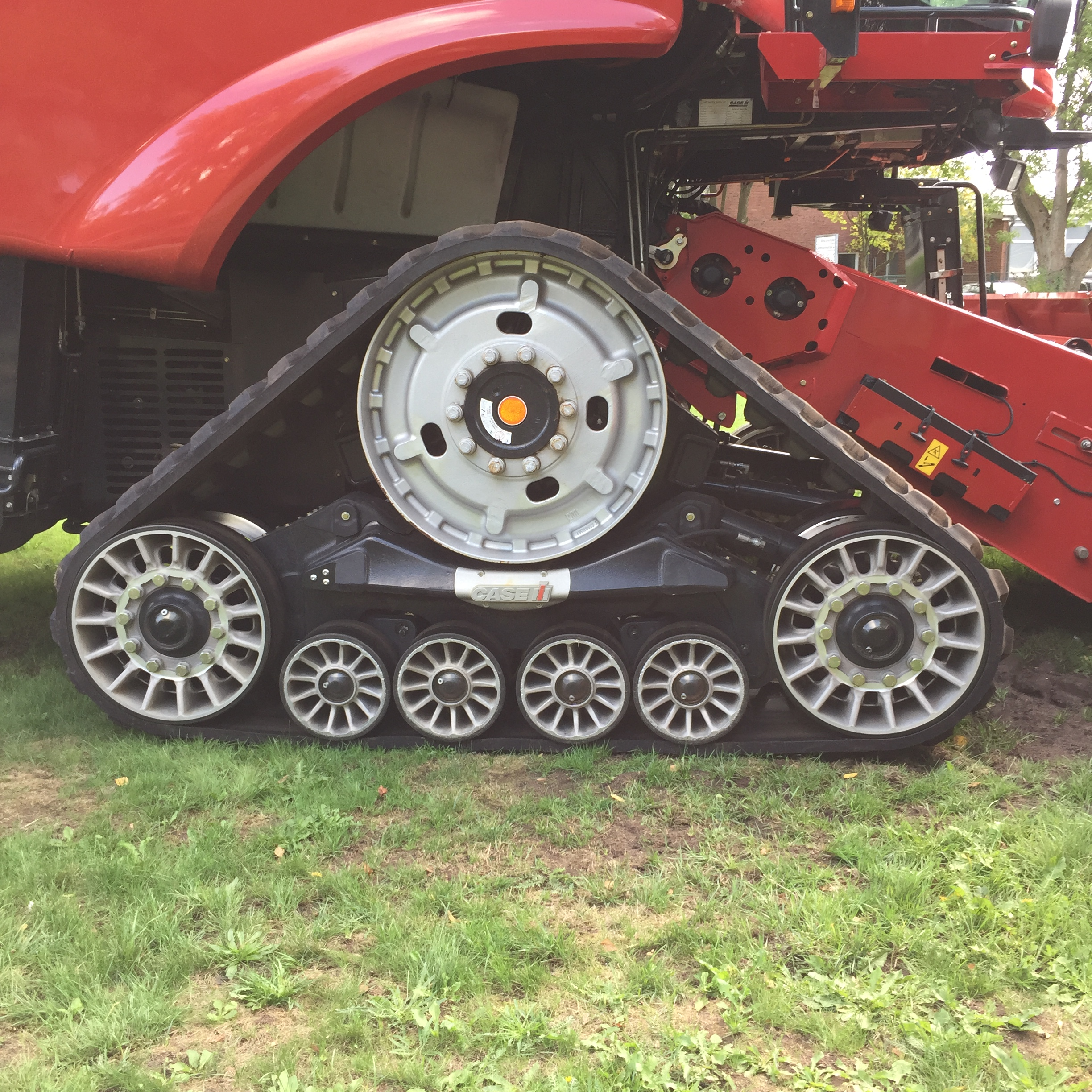 CASE IH Raupenantrieb